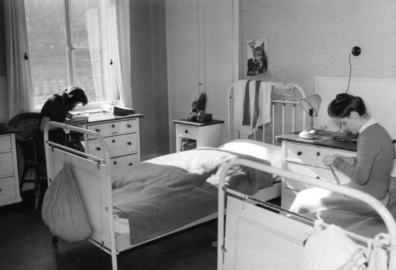 Blindenstudienanstalt Marburg/Lahn Nach dem Mittagessen ist Freizeit. Neben den Schlafräumen stehen auch Wohnzimmer zur Verfügung. Die Mädchen und Jungen schlafen in Zwei- und Dreibettzimmern. Die gesamten Schulabteilungen und Lehrgänge wurden 1952 von 116 Schülern und Schülerinnen besucht.